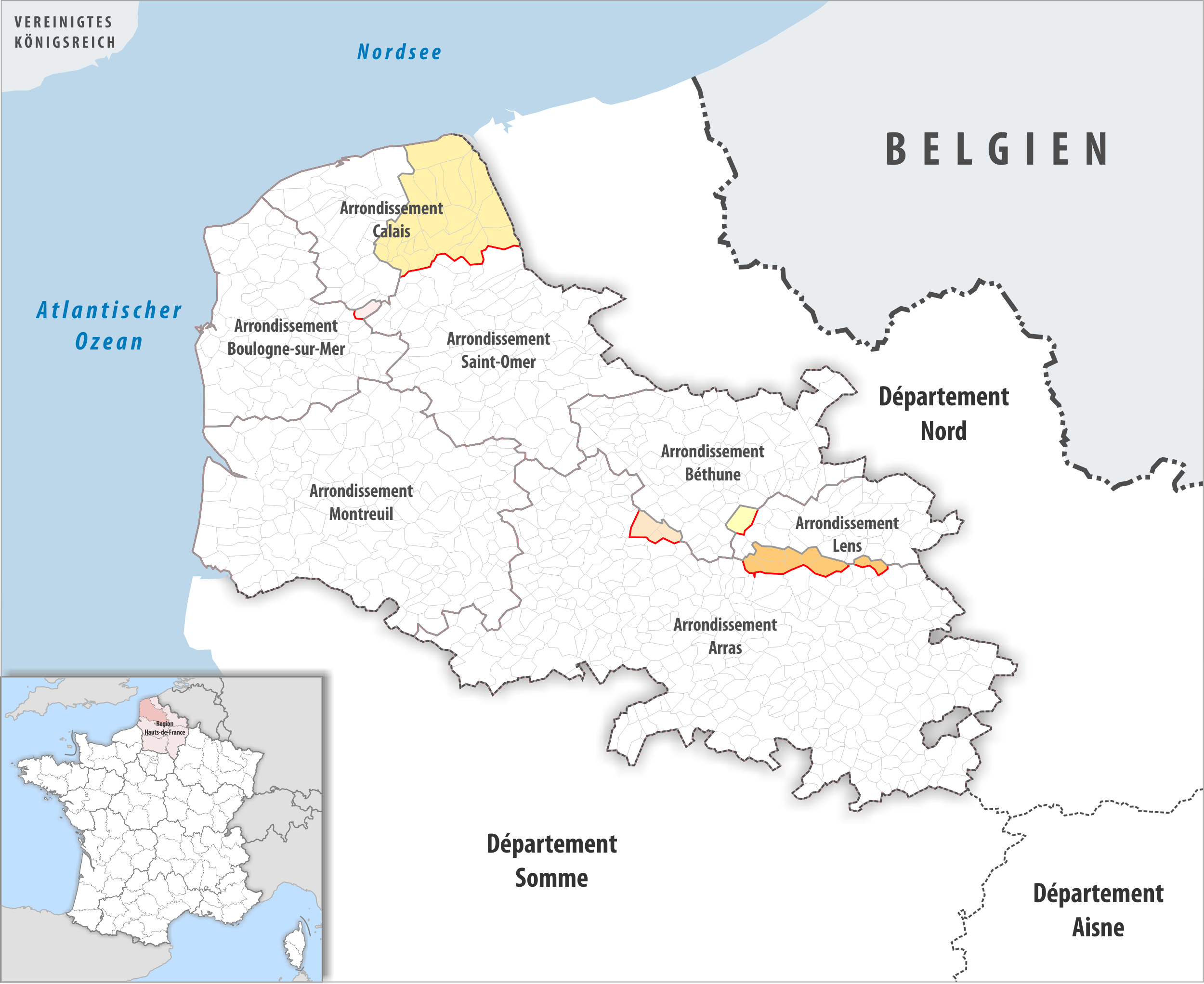 Arrondissements Anpassungen auf 2017 im Departement Pas-de-Calais